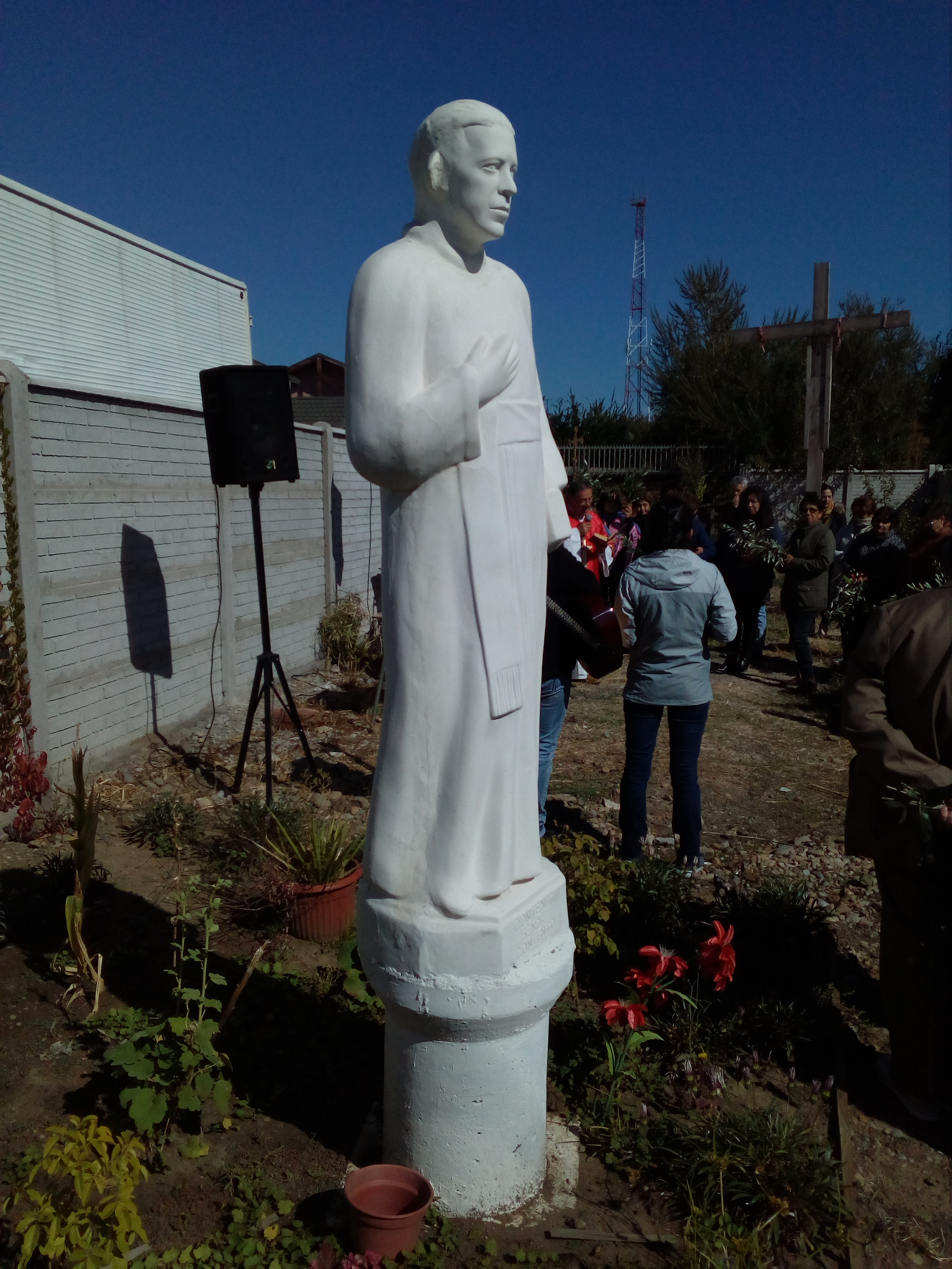 Estatua del padre Alberto Hurtado en parroquia de Jesús Obrero, Linares, Chile.